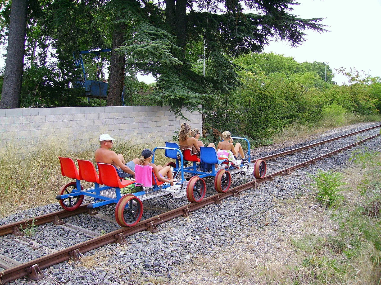 Vélo-rails à Saint-Thibéry sur l'ancienne ligne de chemin de fer de Vias à Lodève le 22 juillet 2010.